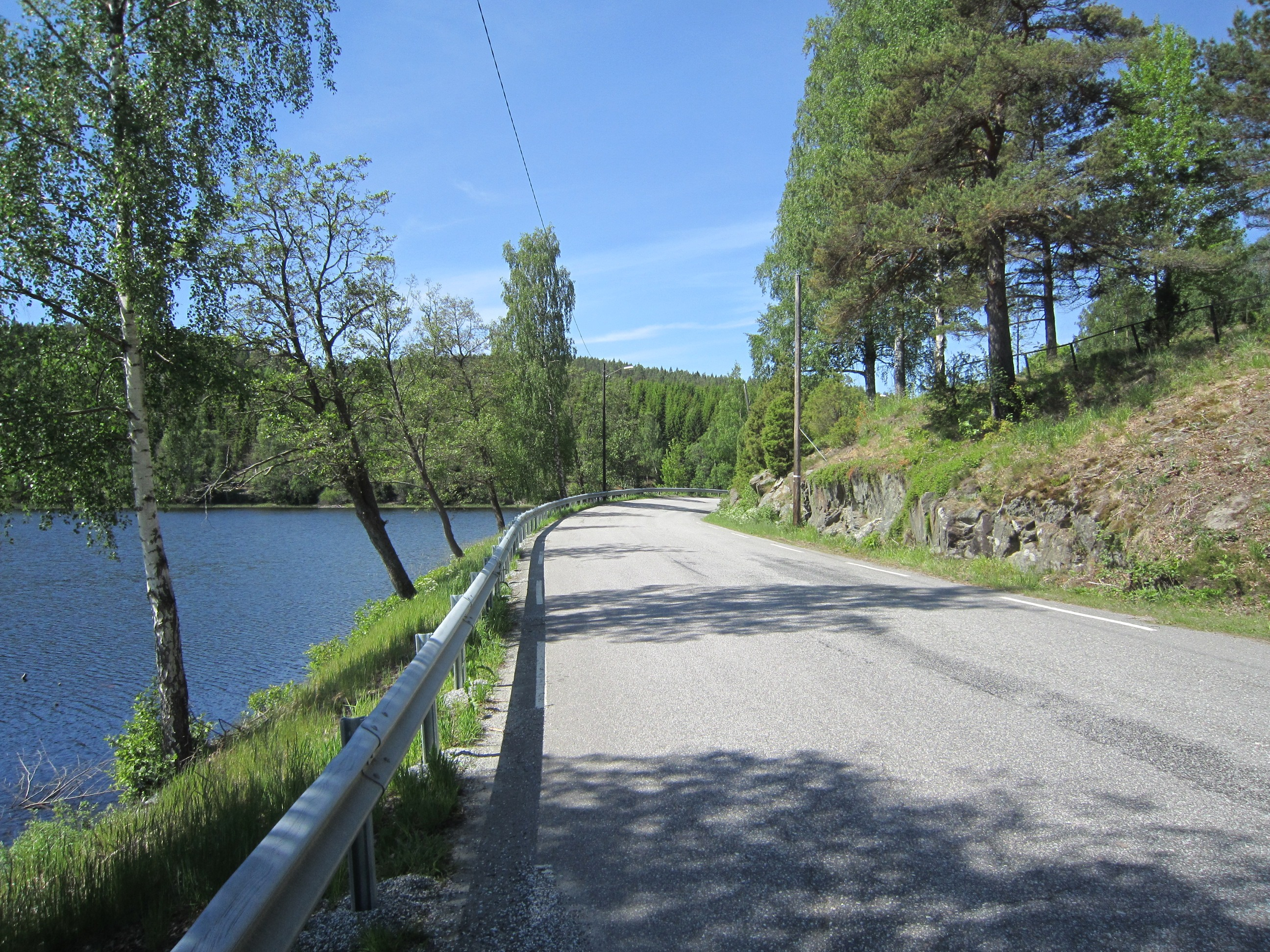 Primær fylkesvei 106 ved Kasetjernet